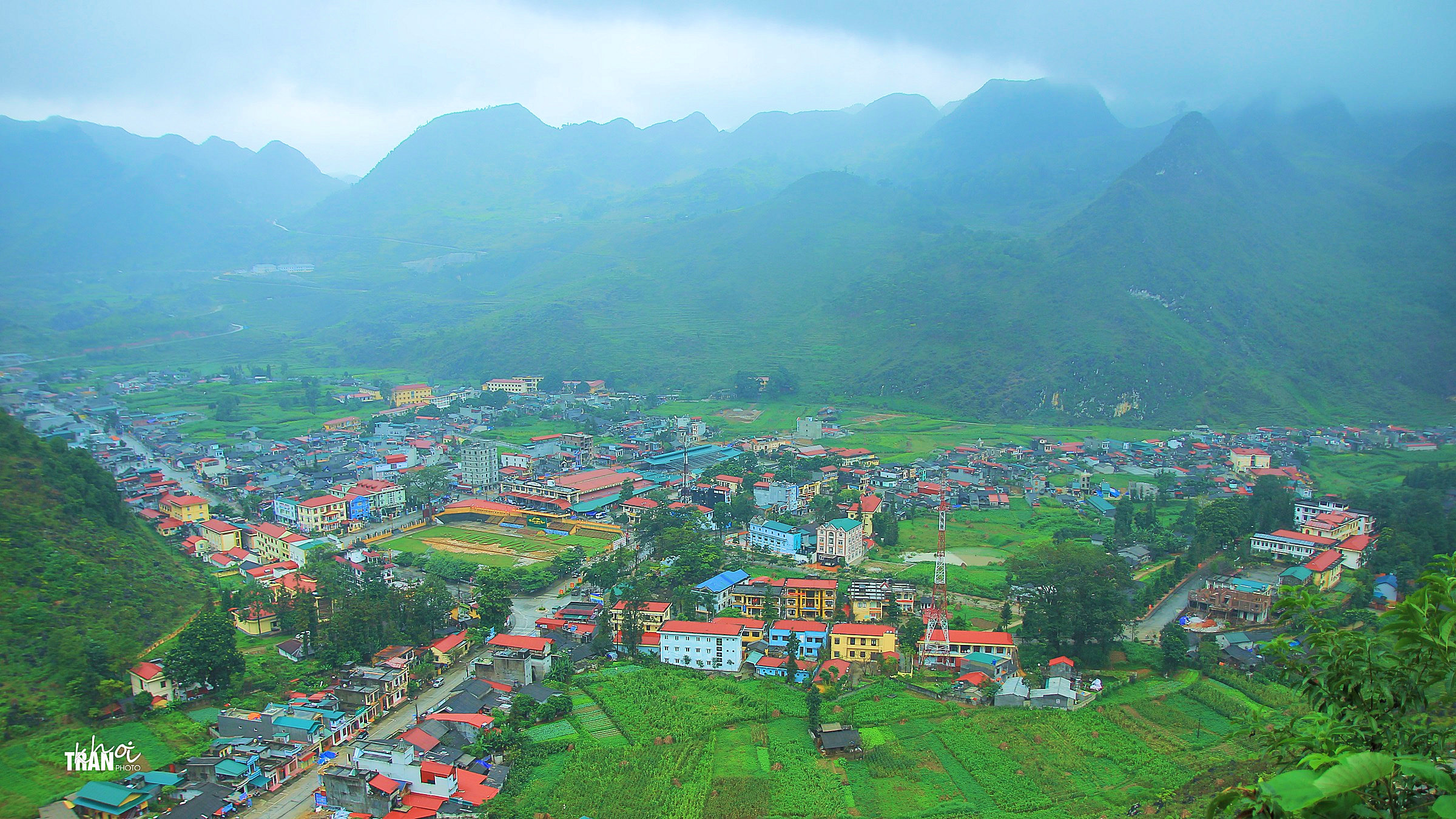 Thị trấn Mèo Vạc nhìn từ điểm viewpoint